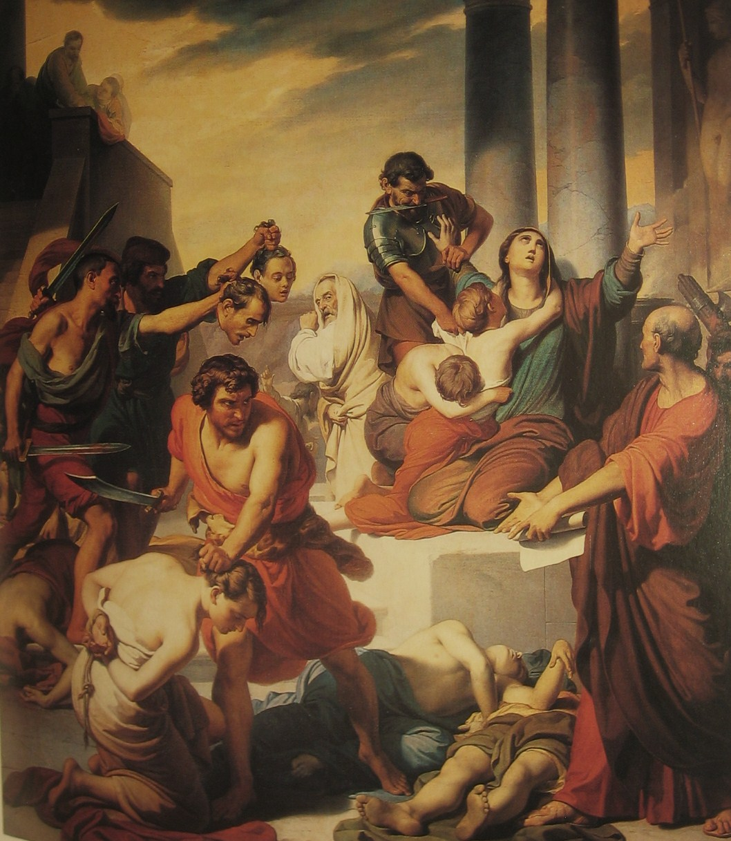 Francesco Coghetti, Martirio di Santa Felicita e dei suoi sette figli, Chiesa parrocchiale di Ranica, Bergamo, Italy